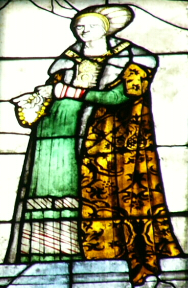 Ausschnitt aus dem Markgrafenfenster von St. Sebald in Nürnberg: Markgräfin Sophia